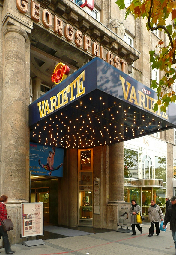 GOP Eingang